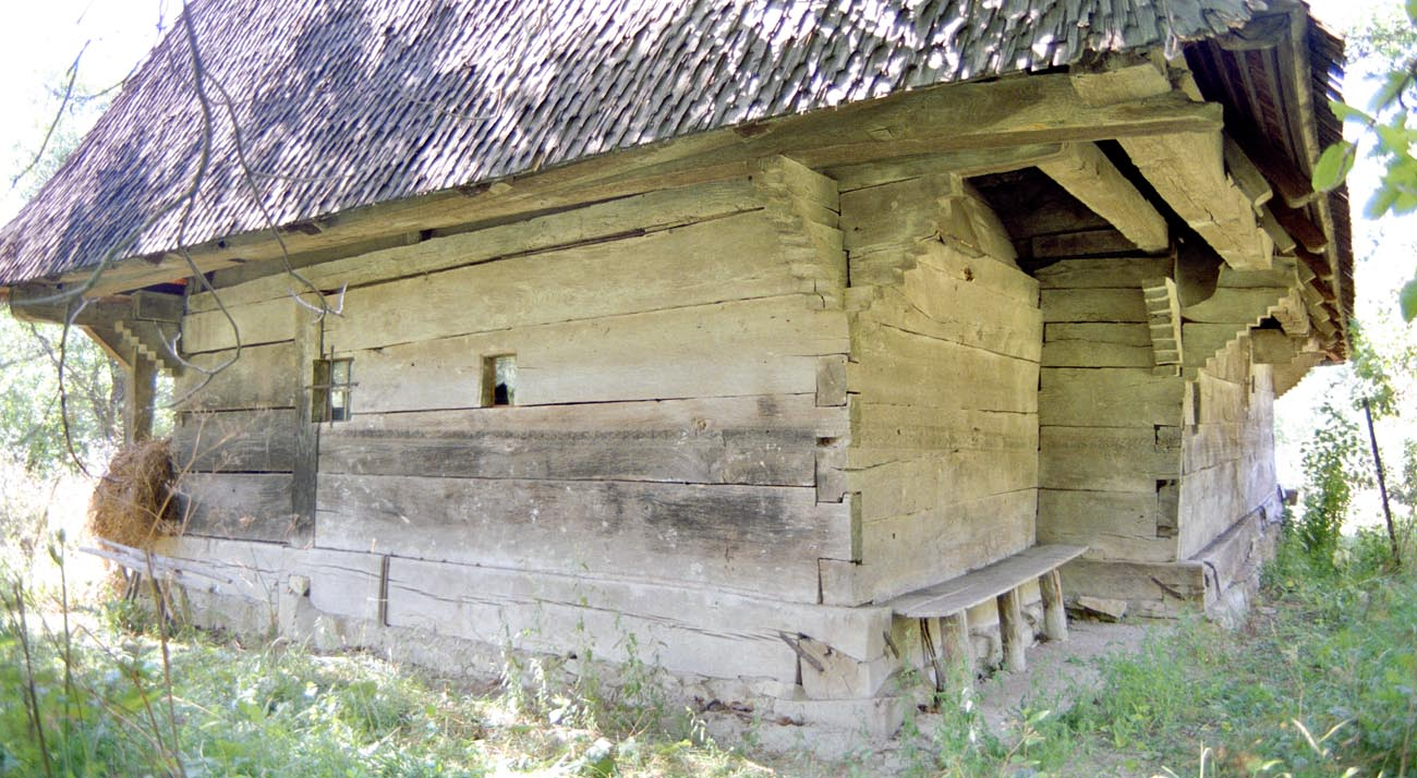 Biserica de lemn din Brebi, butea. Perspectivå din dosul altarului.